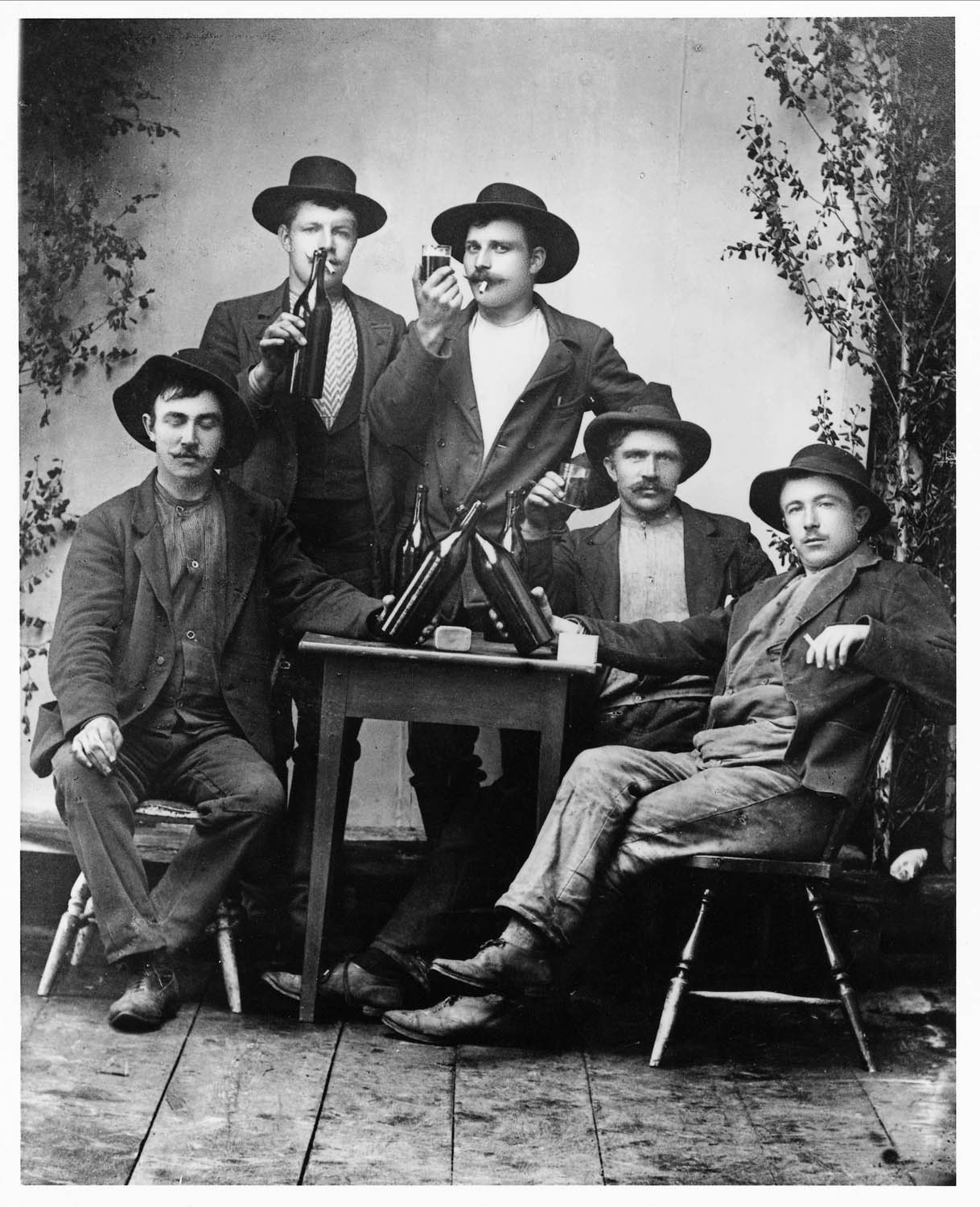 Fem midsommarfirande vägarbetare i ateljén. Männen är arbetsklädda och bär alla hatt, de är grupperade runt ett litet bord, några av dem sitter på pinnstolar och i bakgrunden har lövats med björkris. Männen röker och skålar, några dricker direkt ur flaskan, andra ur glas. Vägbygget gick mellan Lima och Rörbäcksnäs, 1901-1905.